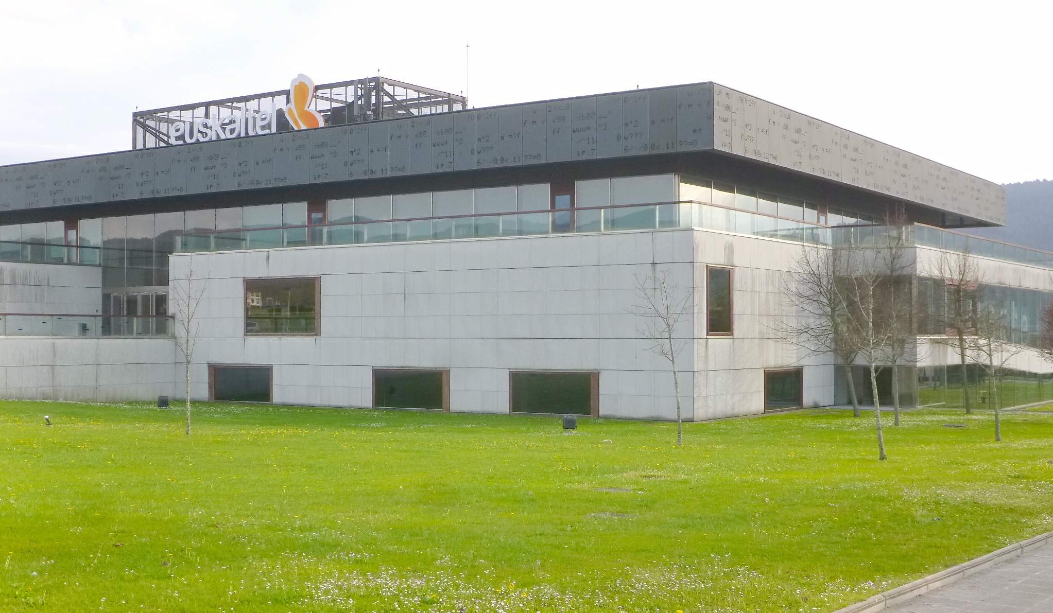 Zamudio - Parque Científico y Tecnológico de Bizkaia, sede de Euskaltel